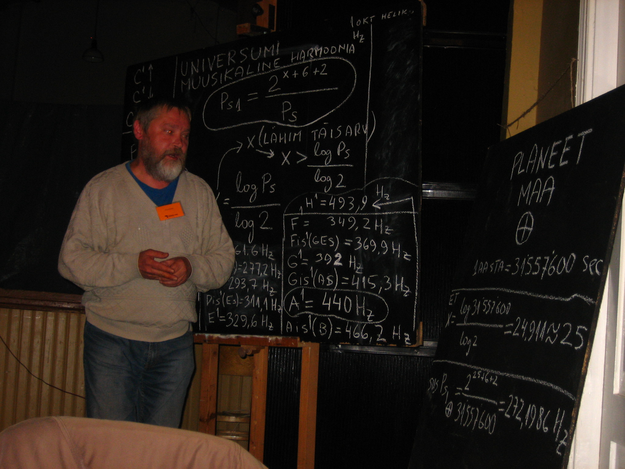 Urmas Sisask 2008.a. teadus.ee suvekoolis